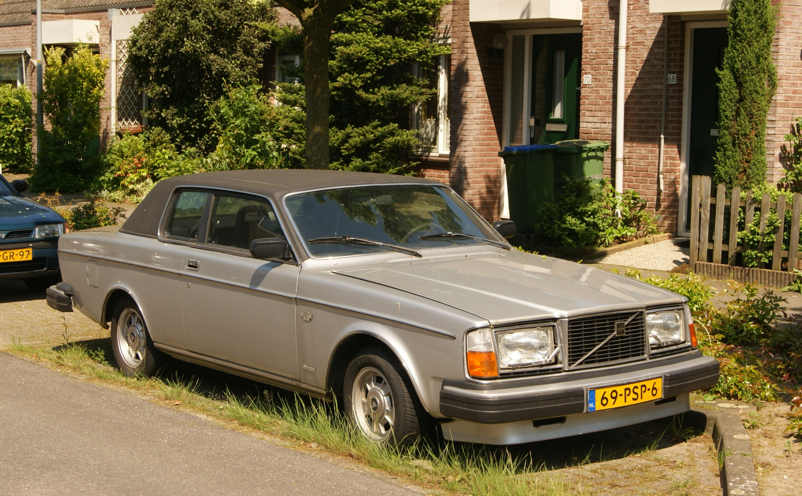 69-PSP-6